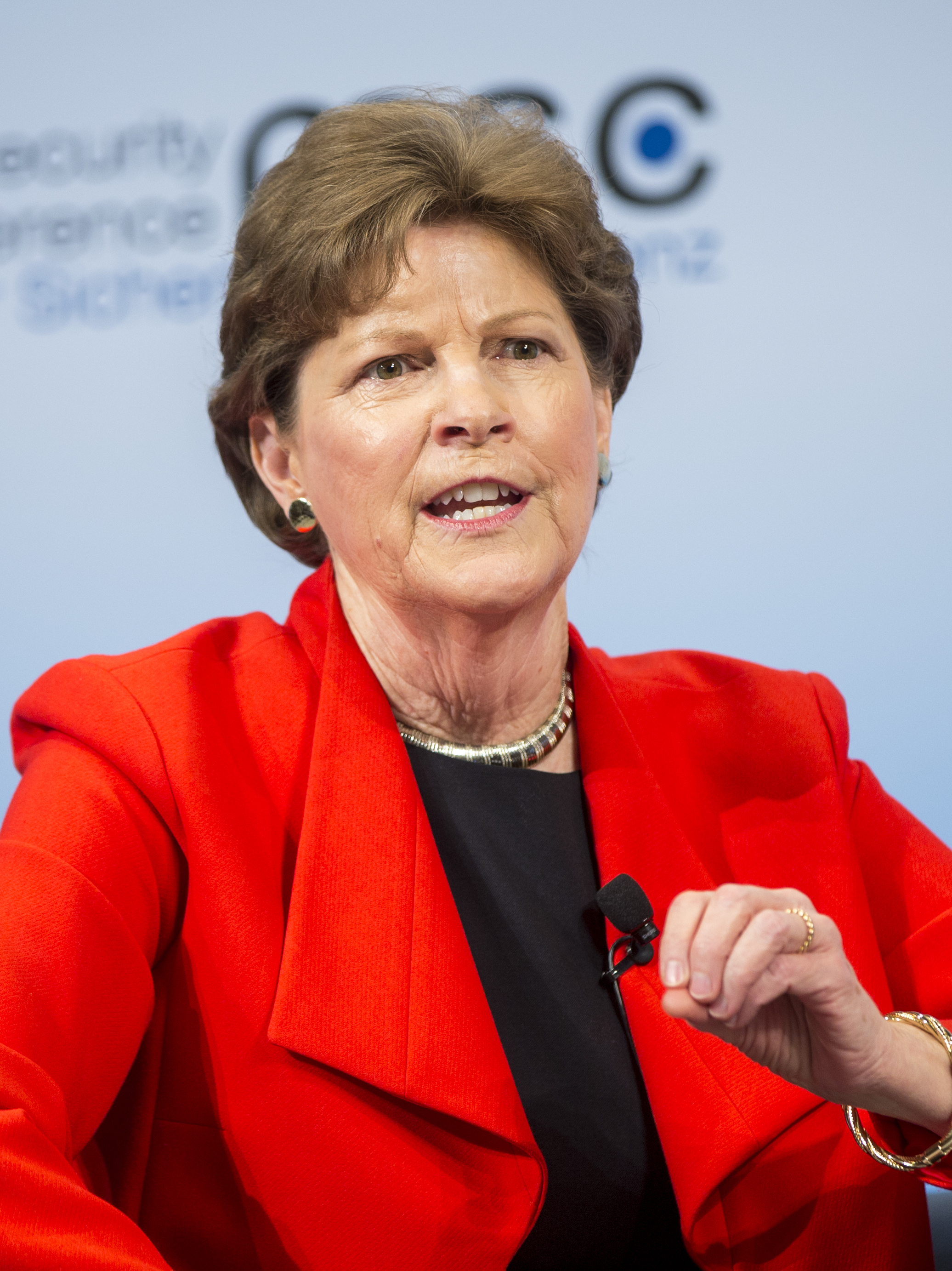 Jeanne Shaheen während der Münchner Sicherheitskonferenz 2017